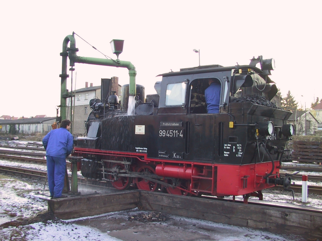 Schmalspurlokomotive der Baureihe 99 beim Wassernehmen auf dem Bahnhof Dippoldiswalde (Weißeritztalbahn) beim Sonderverkehr nach dem Jahrhunderthochwasser